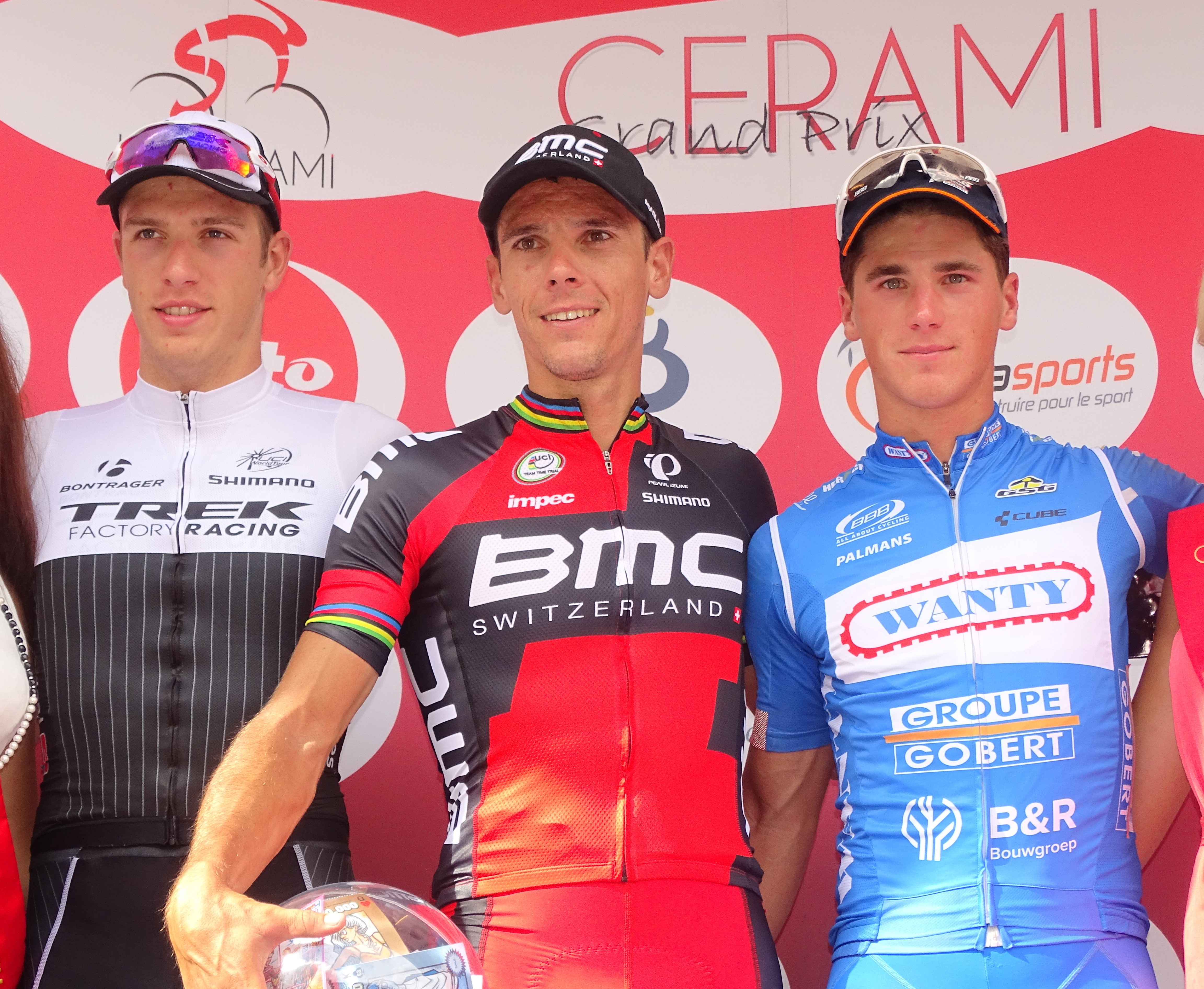 Reportage réalisé le mercredi 22 juillet à l'occasion de l'arrivée du Grand Prix Pino Cerami 2015 à Frameries, Belgique.